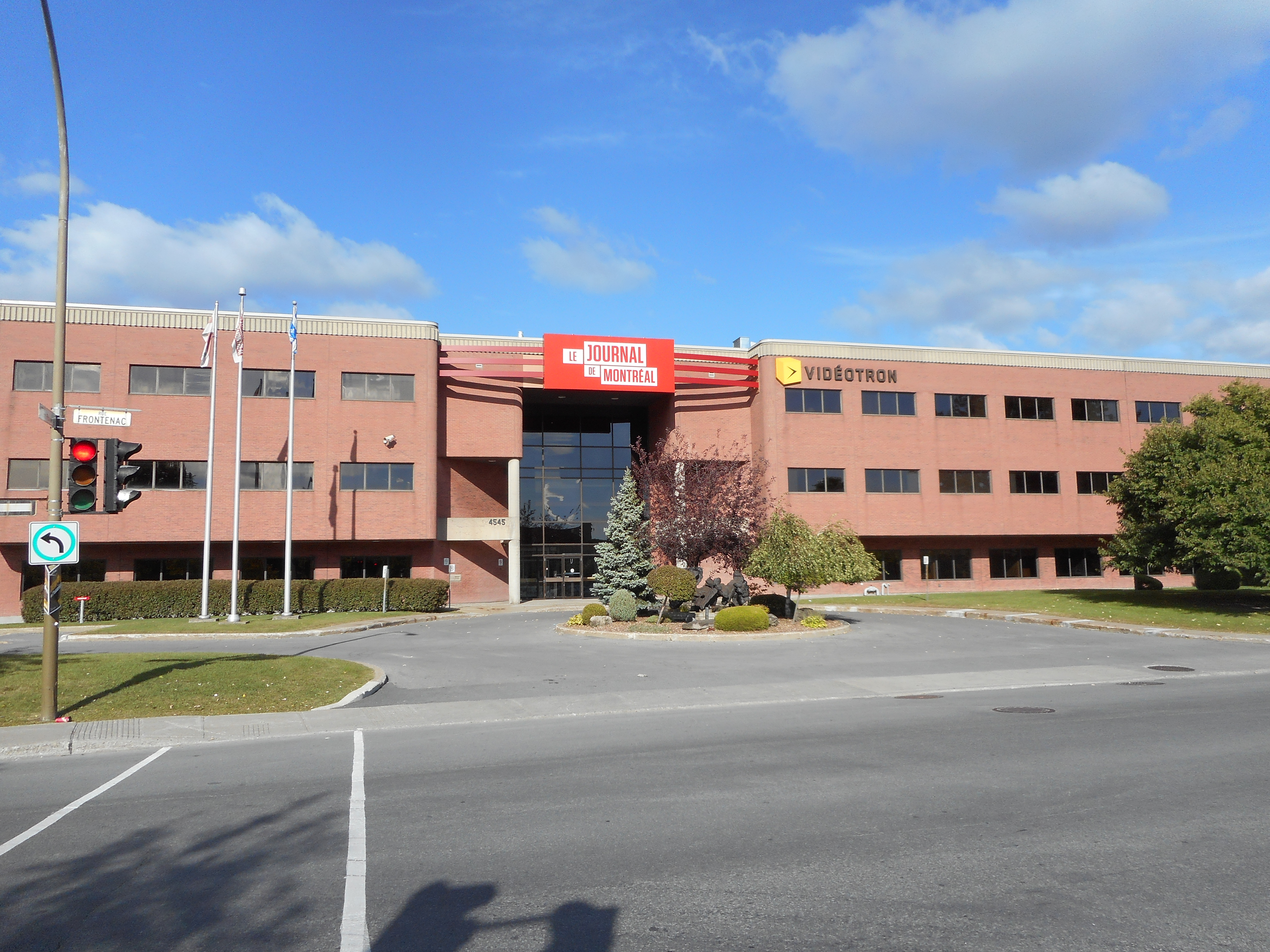 Édifice du Journal de Montréal, 4545, rue Frontenac, Montréal